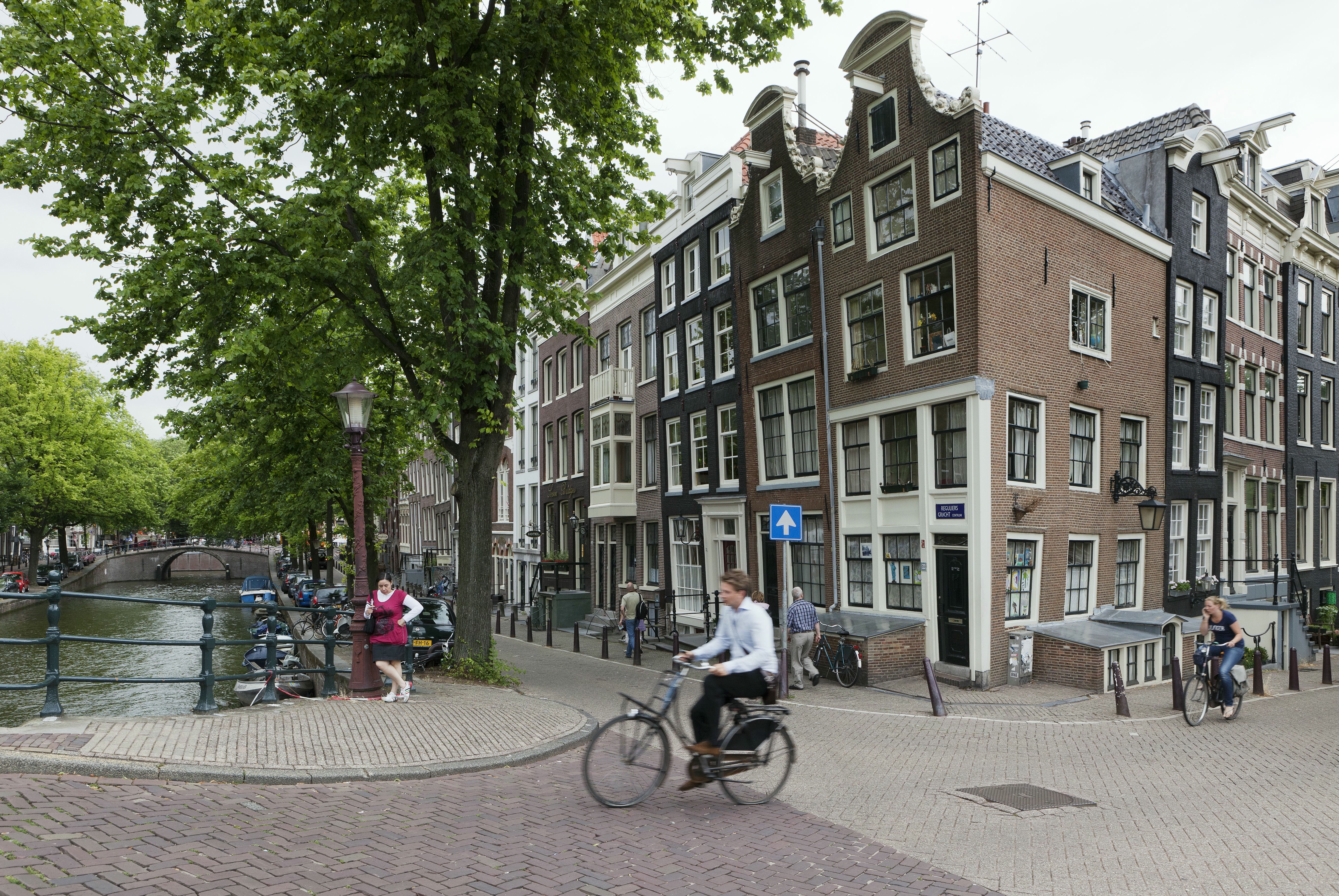 Grachtengordel/ Grachten: Zicht op de hoekpanden van de Reguliersgracht en om de hoek naar de Keizersgracht en mensen op straat (opmerking: De Amsterdamse grachtengordel staat sinds 1 augustus 2010 op de lijst van werelderfgoedlijst van UNESCO)